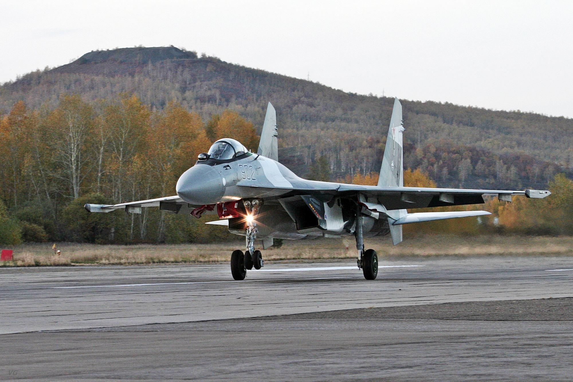 Un Soukhoï Su-37 au décollage